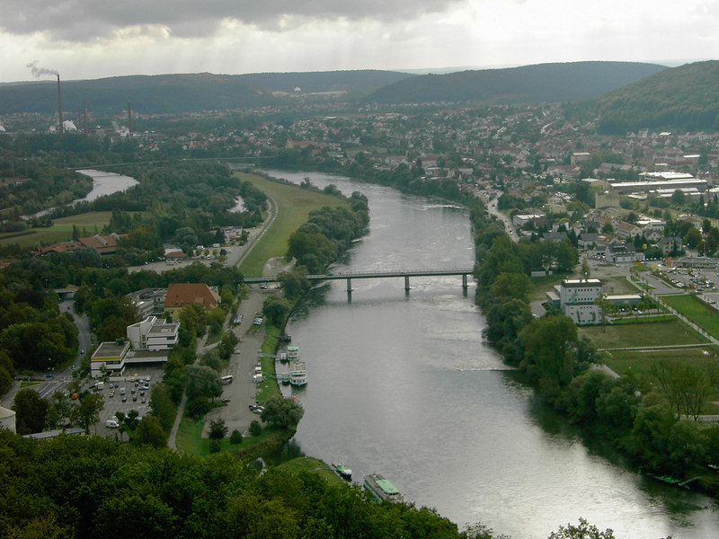 Blick von der Befreiungshalle auf die Donau und den Kelheimer Ortsteil Affecking